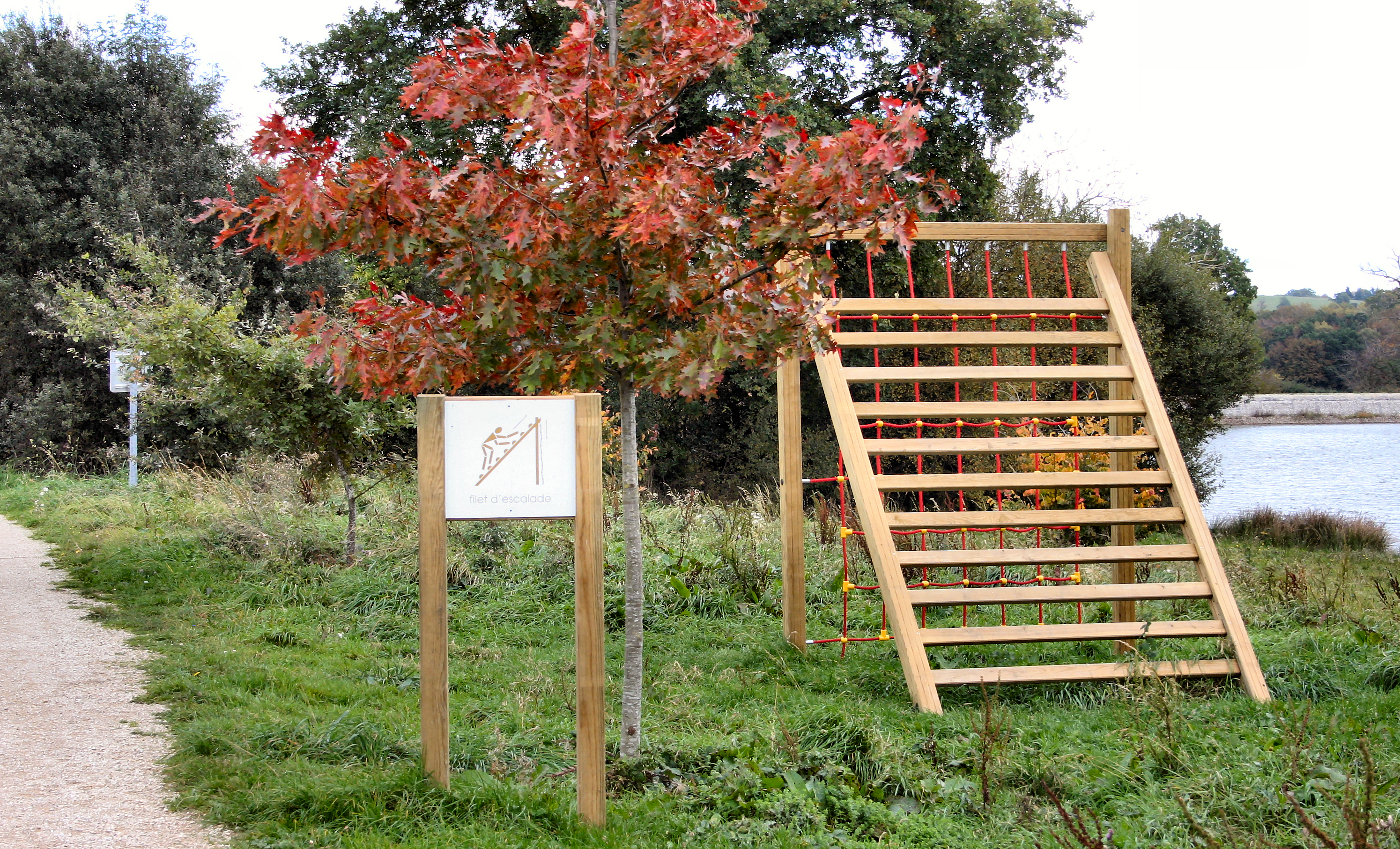 Appareil d'escalade sur le parcours de santé en bordure du lac de Baraquevile (Aveyron)